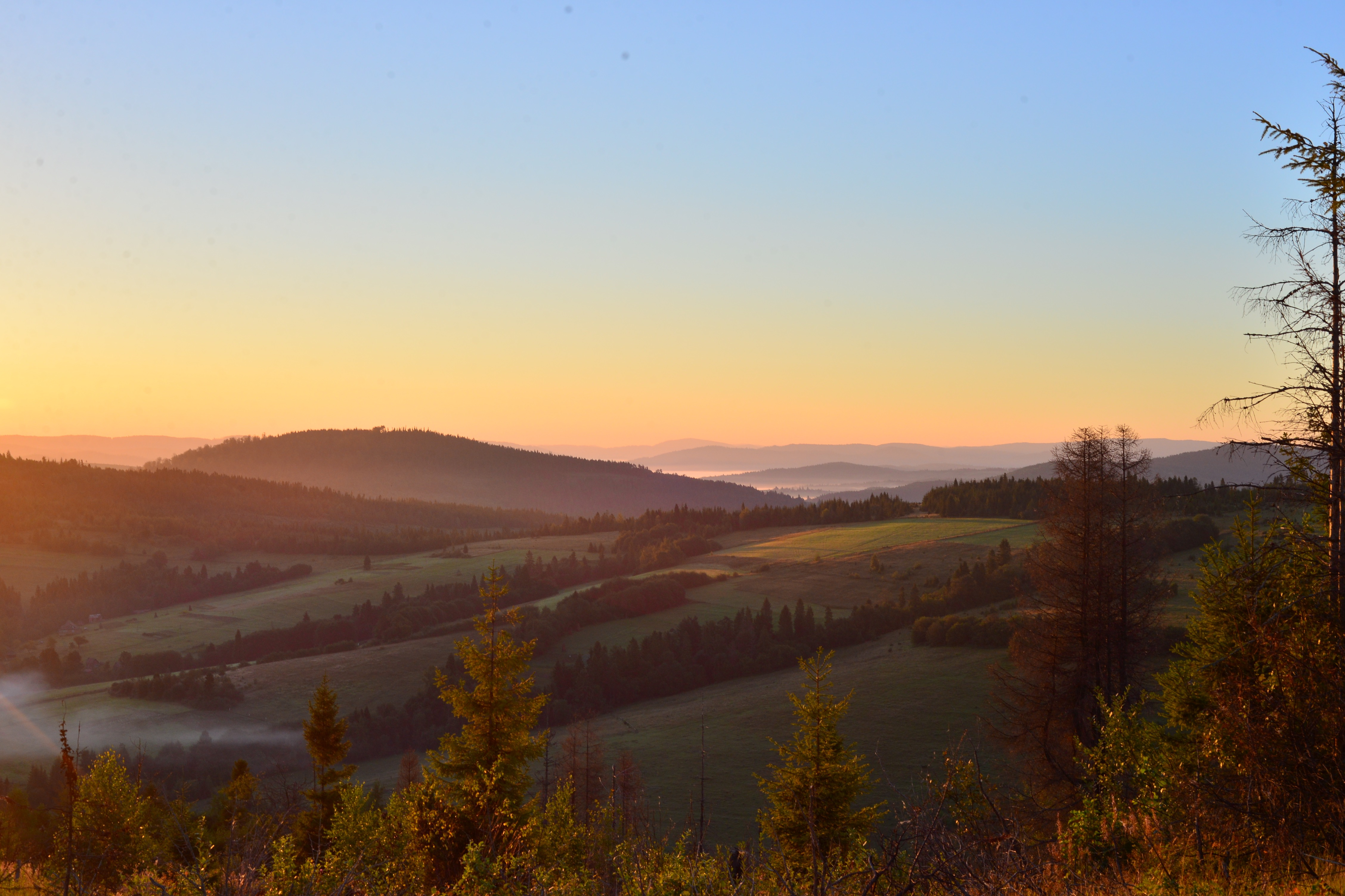 Karpatske (Ukrainian: Карпа́тське;[1] formerly known as Hnyla, Гни́ла